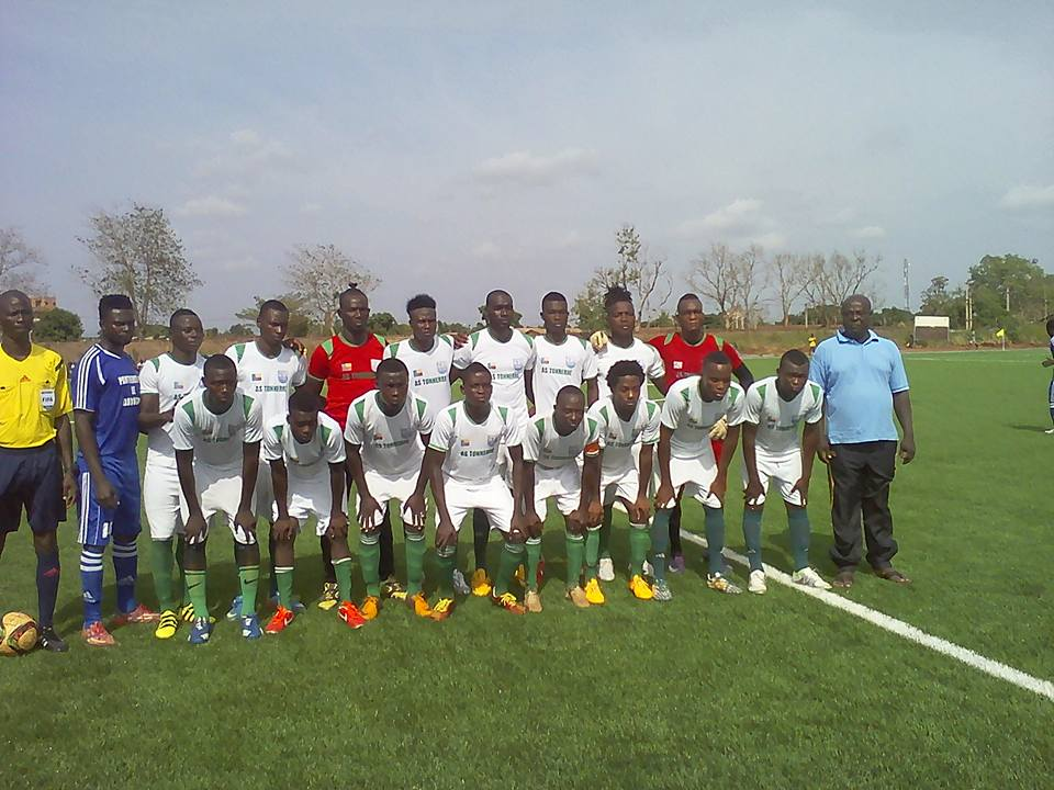 Stade municipal de Bohicon gazon synthétique